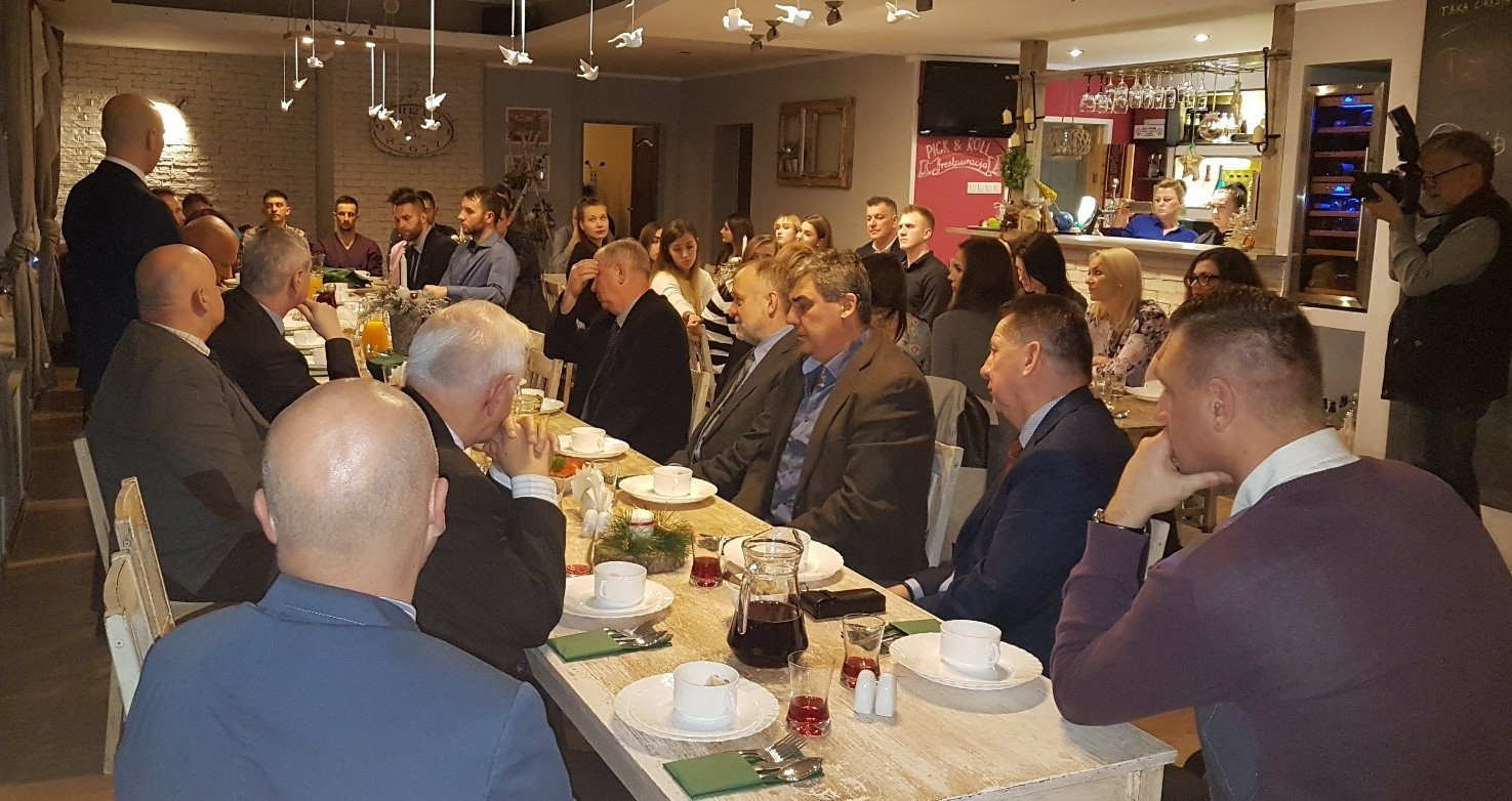 Stargard 19.12.2017. Wigilia w Spójni